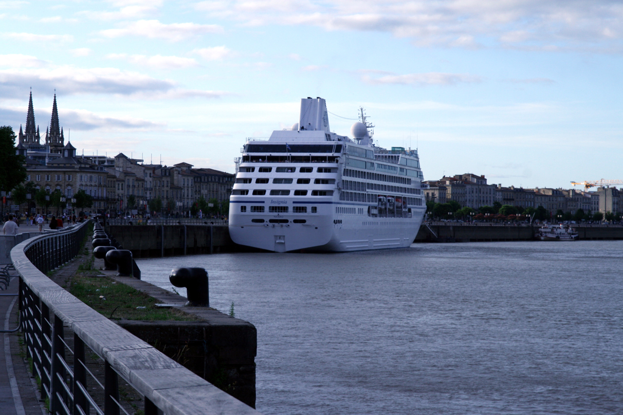 MS Insignia à Bordeaux